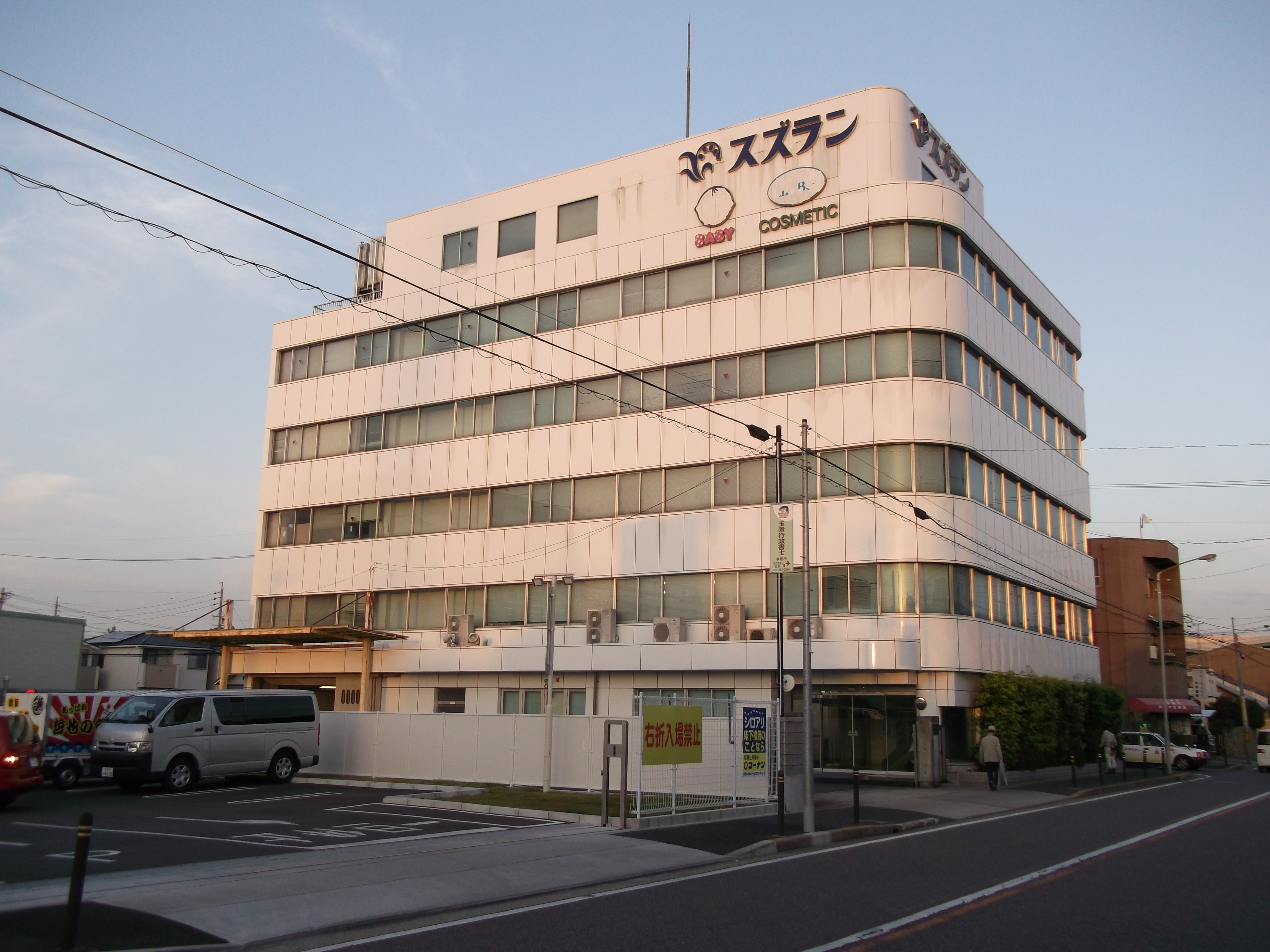 名古屋市北区安井のスズラン本社ビル